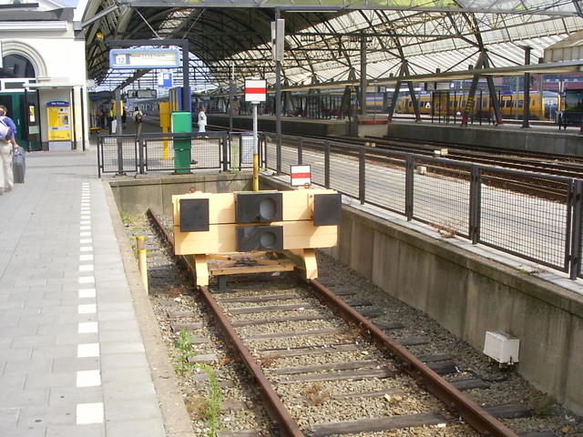 Zwols stootblok Kamperlijntje